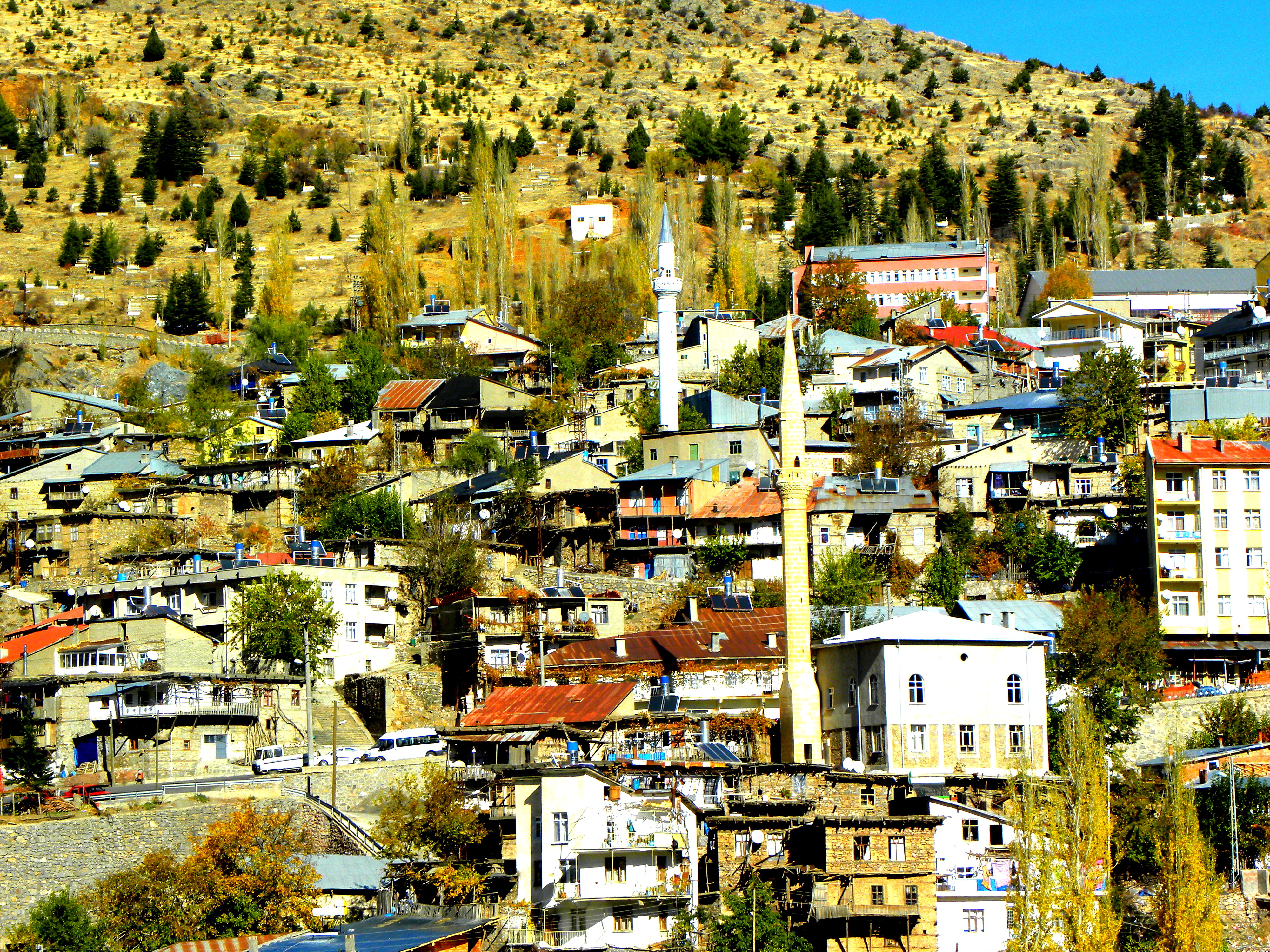 Taşkent/Konya, Turkey